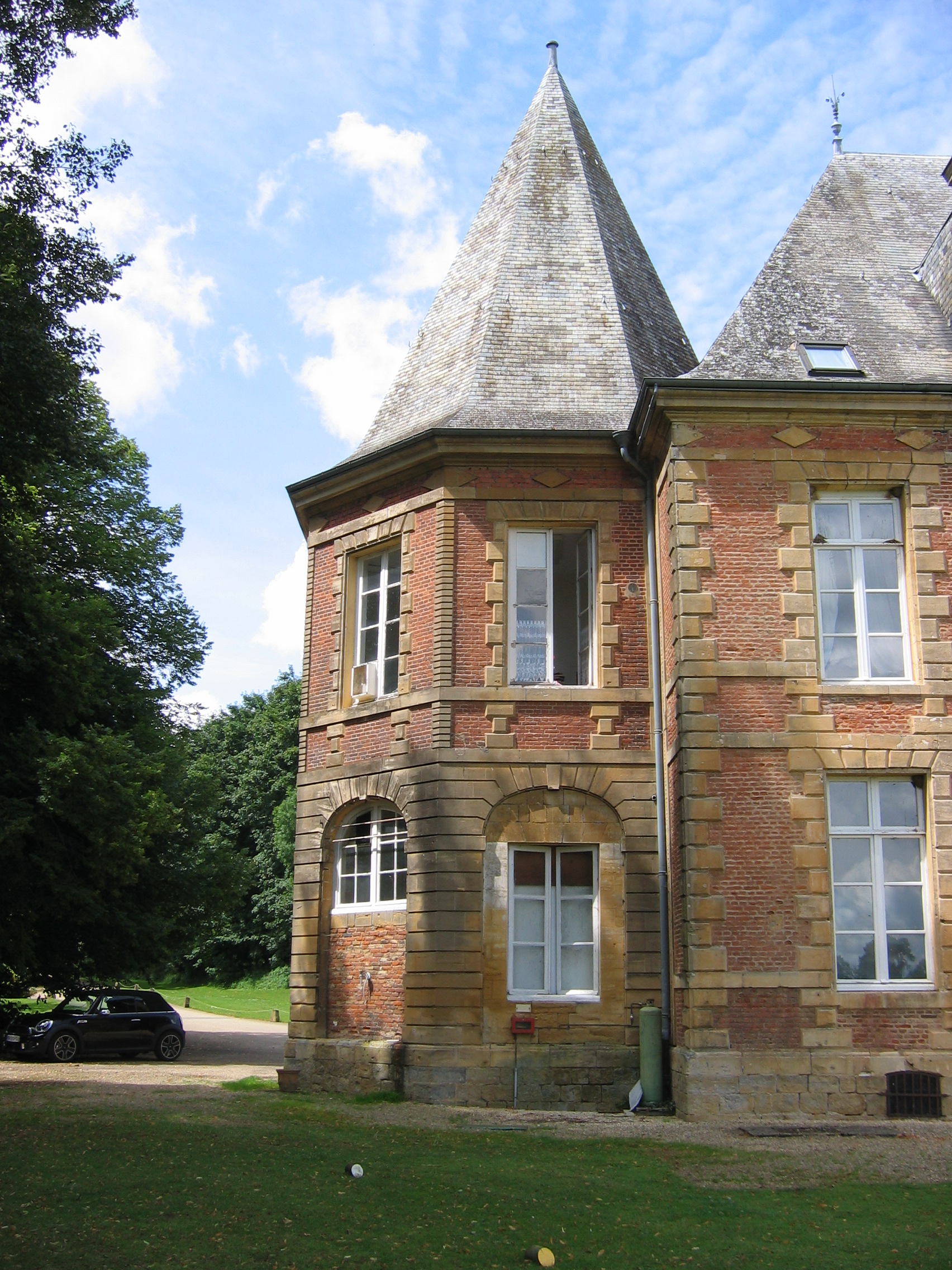 Abbaye Notre-Dame des Sept-Fontaines Fagnon Ardennes France V3 ancienne construction